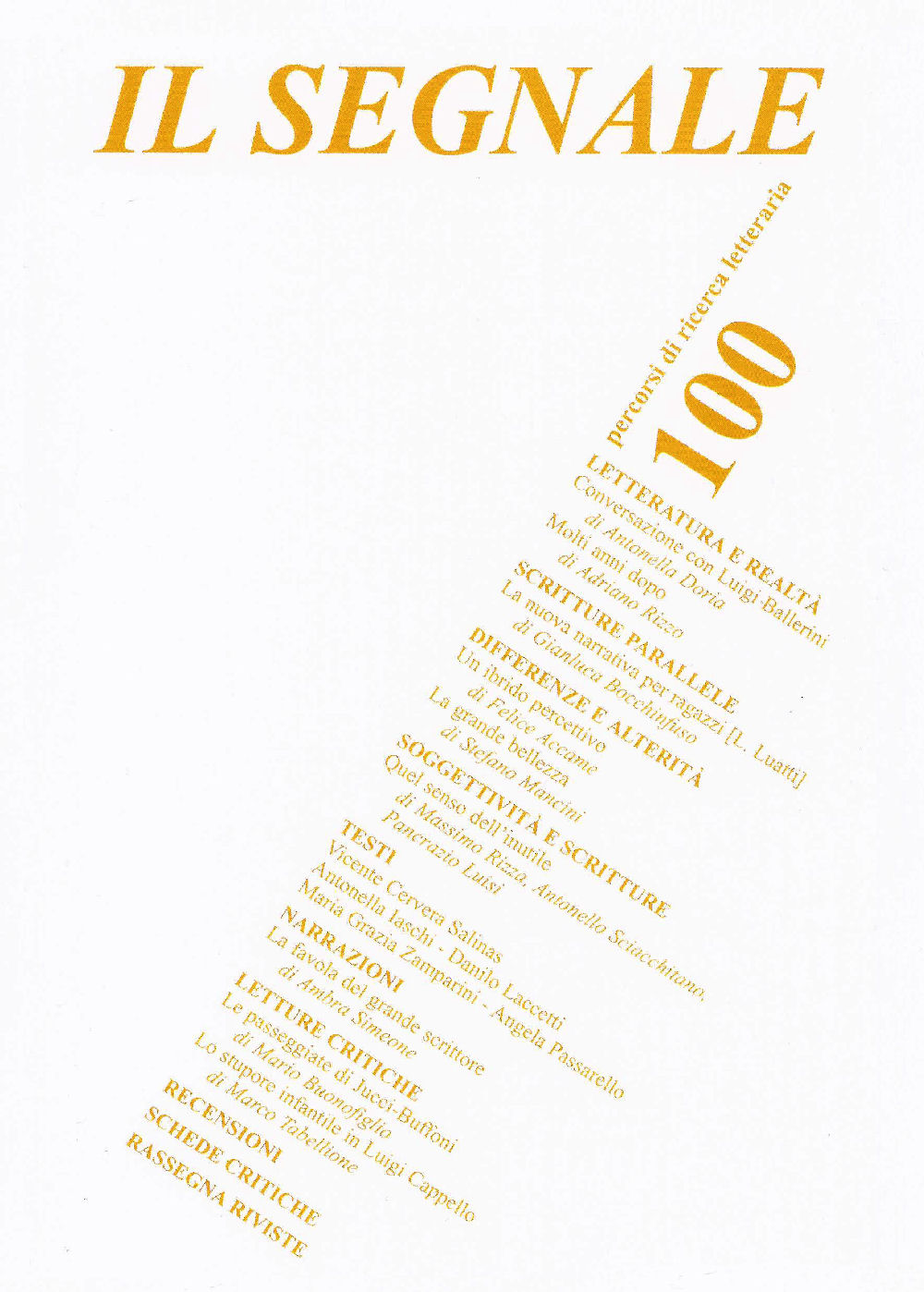 Copertina del n. 100 della rivista letteraria "Il Segnale. Percorsi di ricerca letteraria"